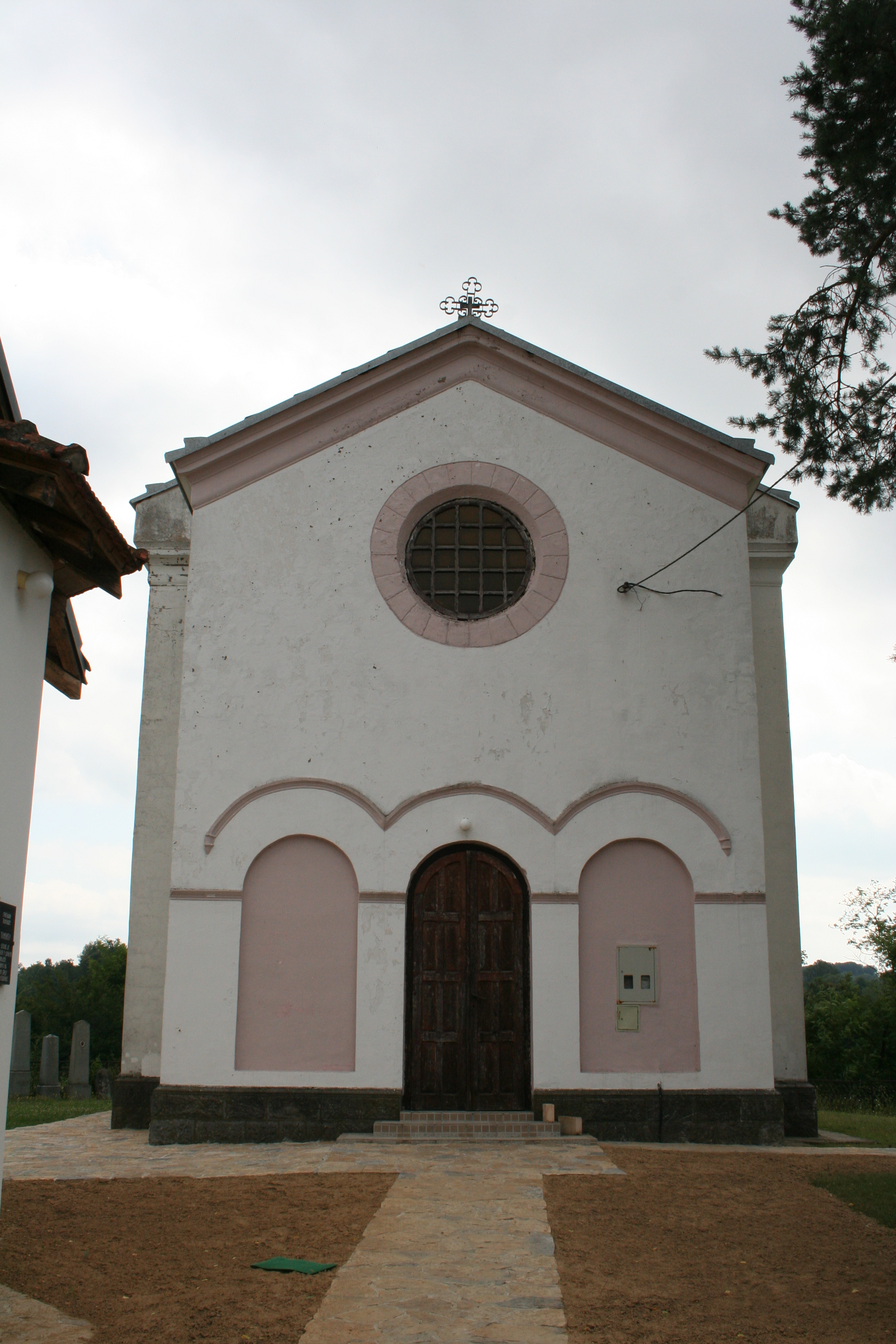 Crkva Vaznesenja Gospodnjeg, Donje Crniljevo